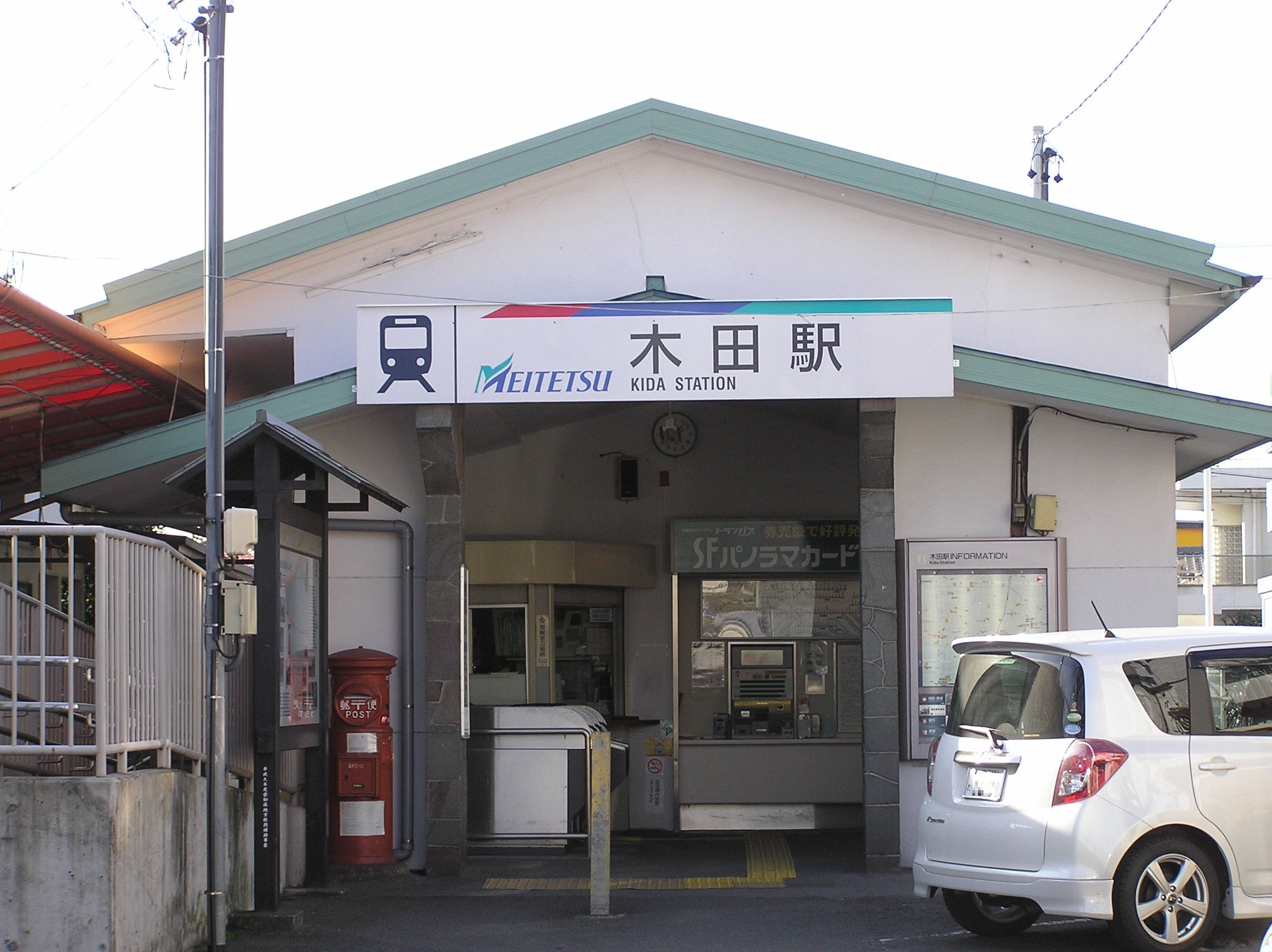 名古屋鉄道津島線木田駅